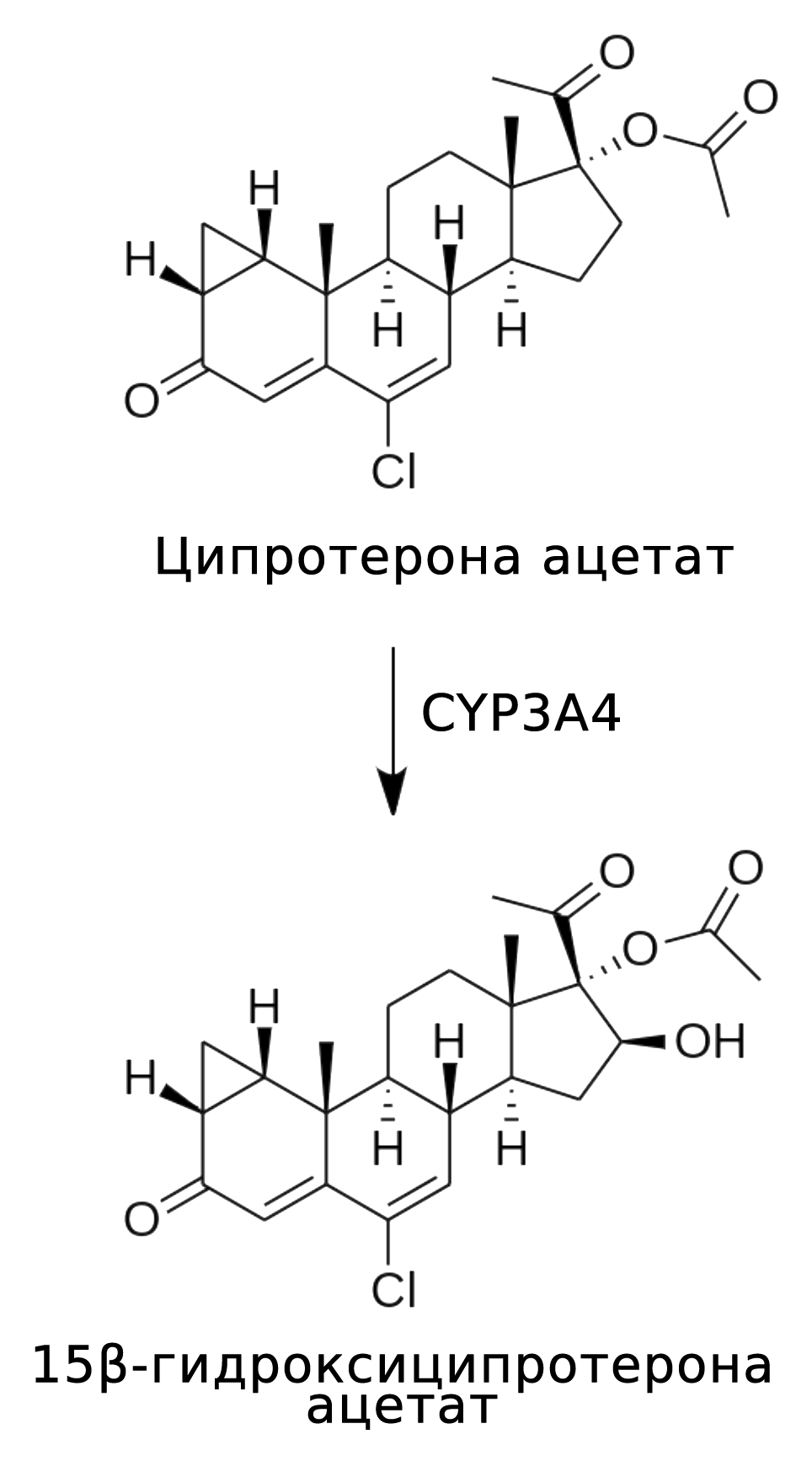 Метаболизм / биотрансформация ципротерона ацетата в организме человека.